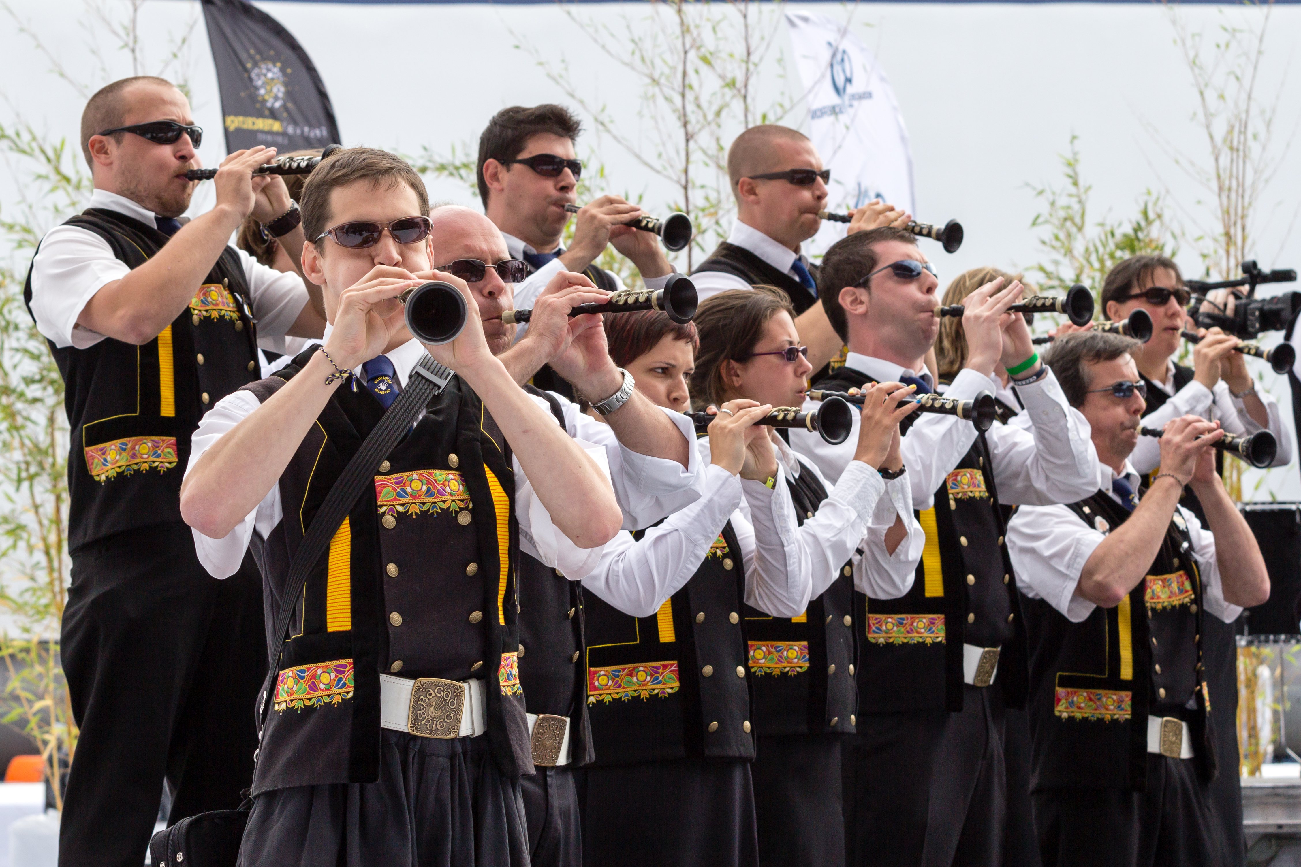 Le bagad Brieg lors du championnat national des bagadoù (première catégorie) au FIL 2012.